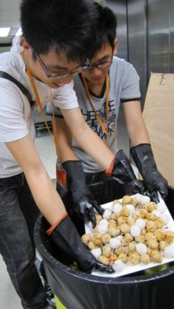 香港宴會所產生的廚餘多得驚人